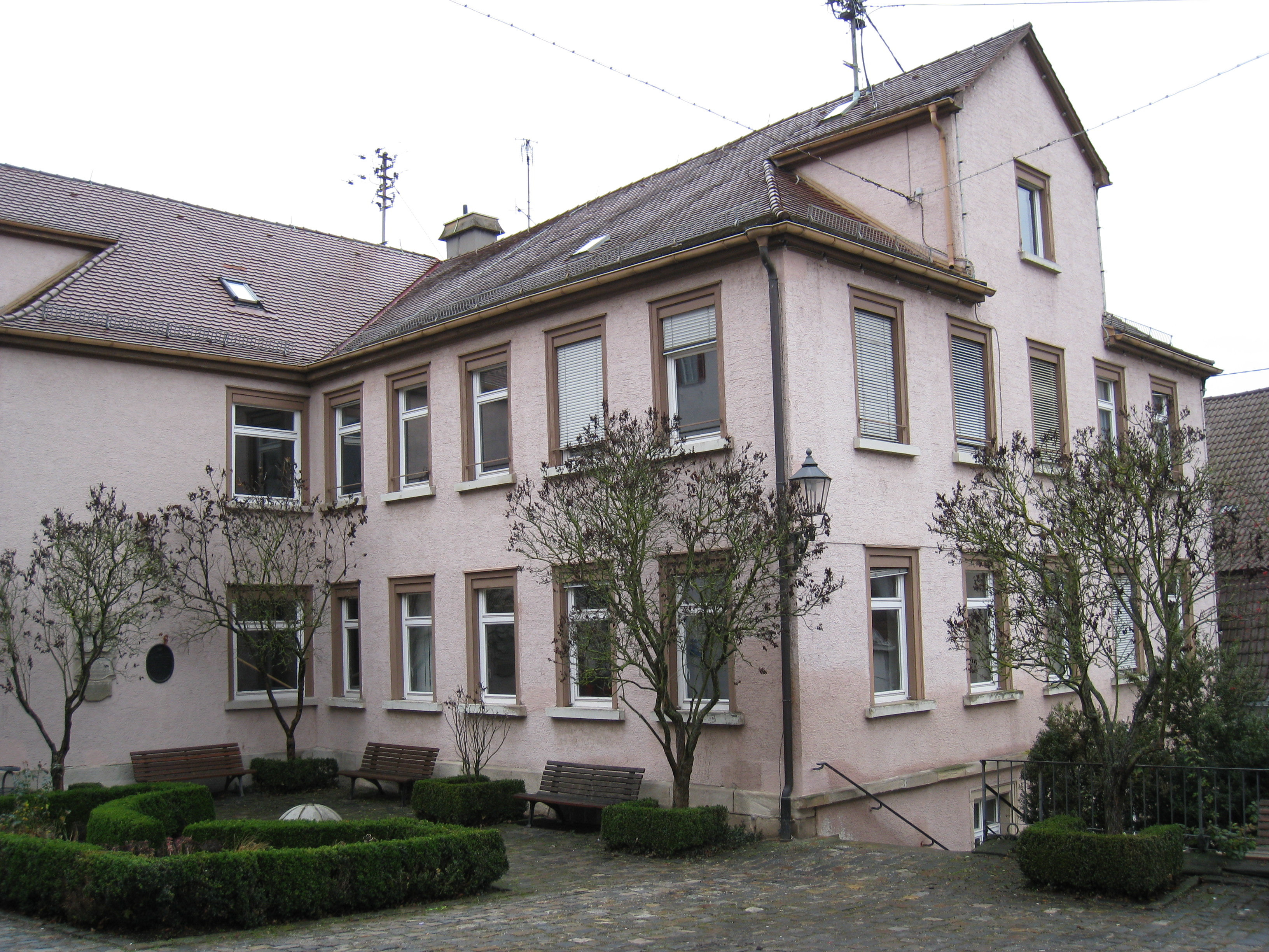 Das Hölderlinhaus in Nürtingen, Neckarsteige 1, war 24 Jahre das Wohnhaus der Familie Hölderlin-Gock.